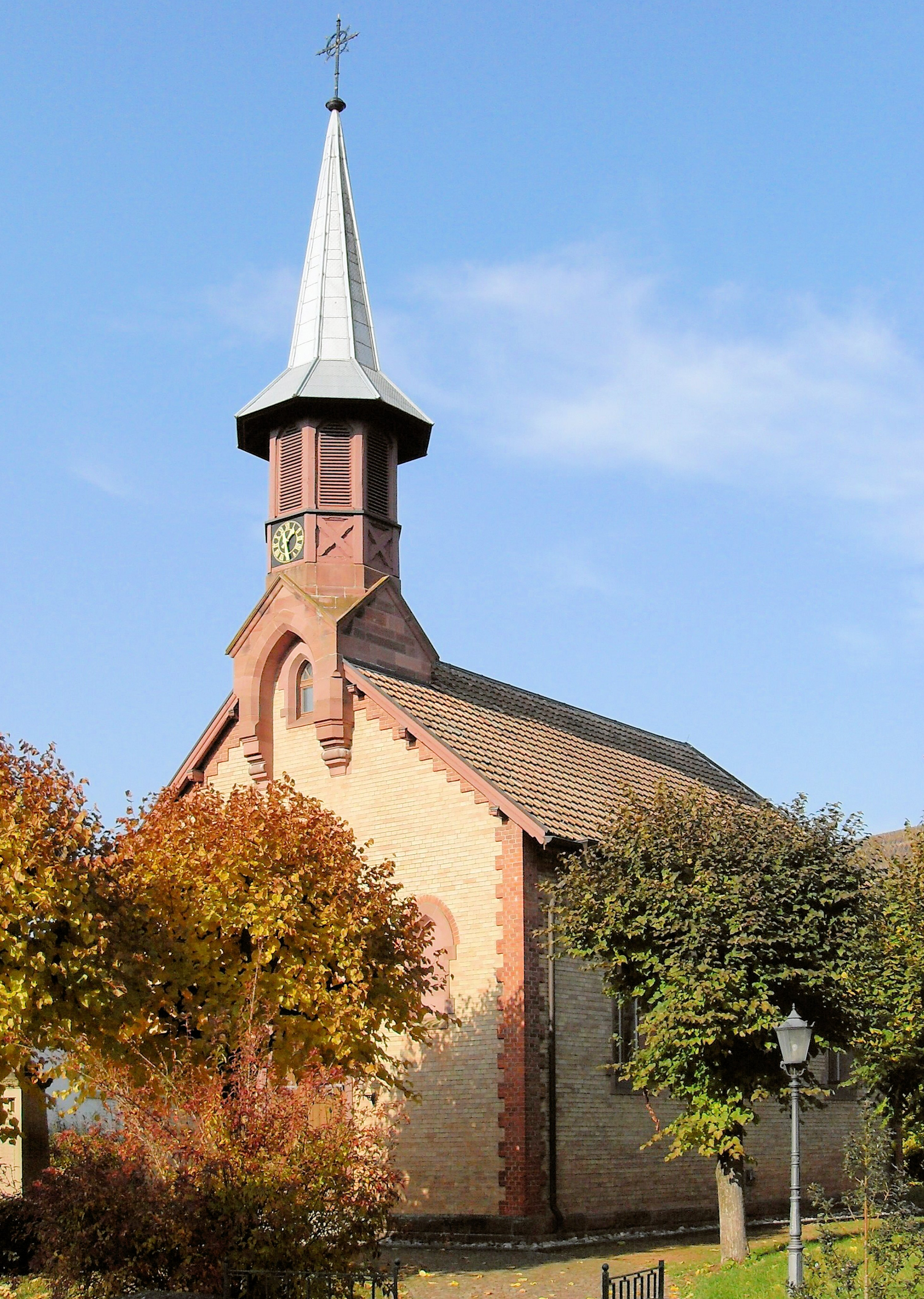 Kirche St. Martin im Müllheimer Ortsteil Niederweiler, Baden-Württemberg, Deutschland